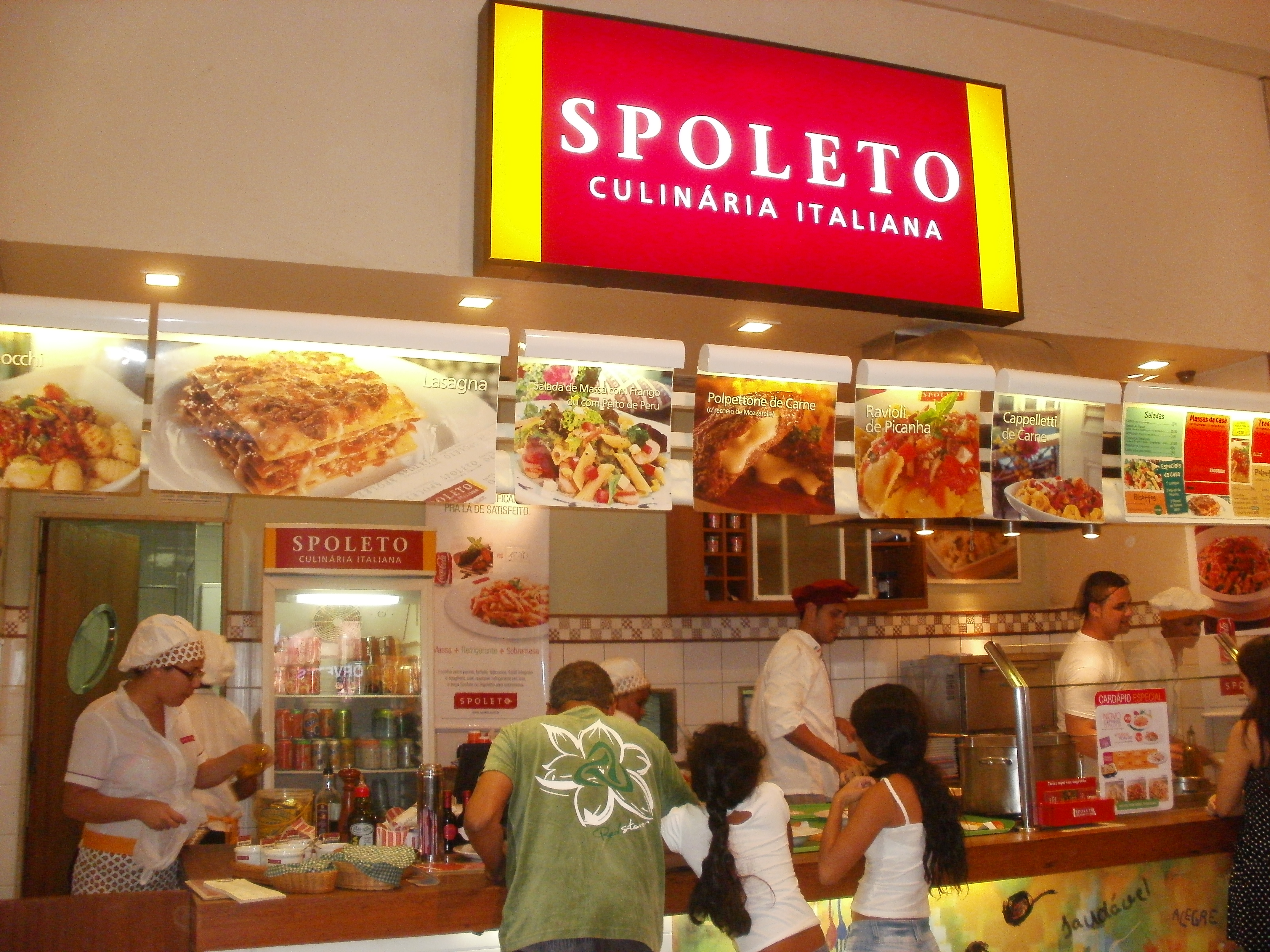 Spoleto, no Caxias Shopping, em Duque de Caxias, estado do Rio de Janeiro, Brasil.